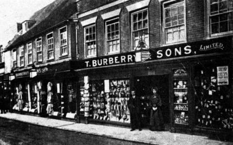 Premier magasin de Burberry fondé en 1856 à Basingstoke dans Hempshire